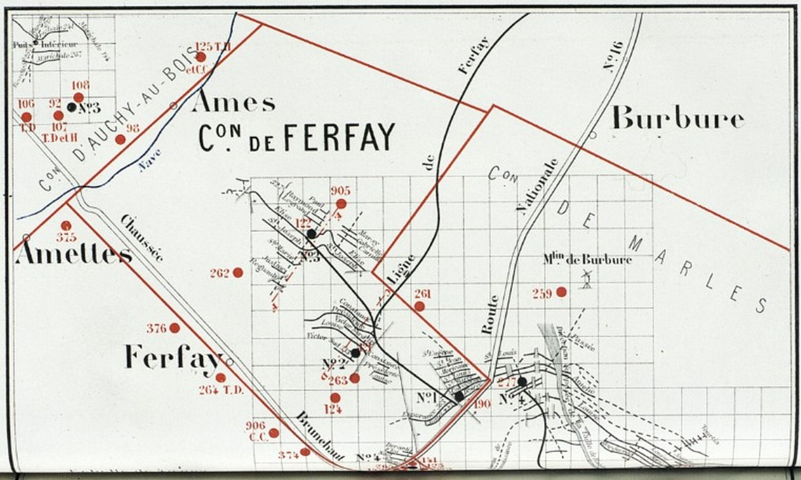 État des travaux de la Compagnie des mines de Ferfay vers 1880.